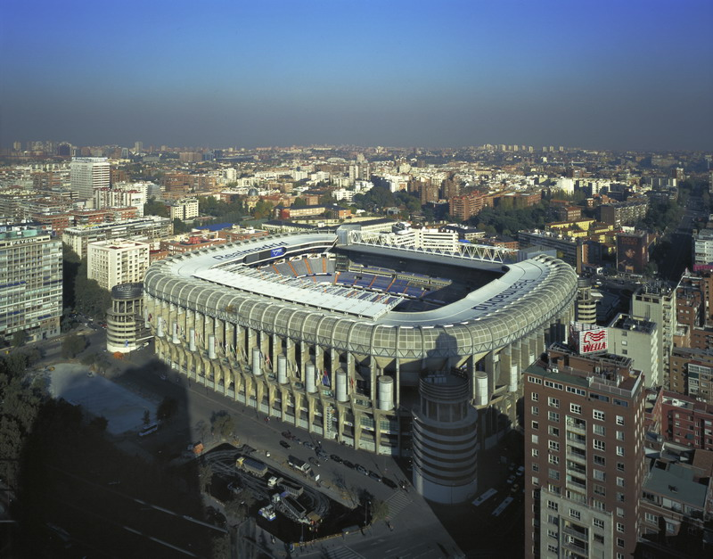 Estudio Lamela. Ampliación del Estadio Santiago Bernabéu